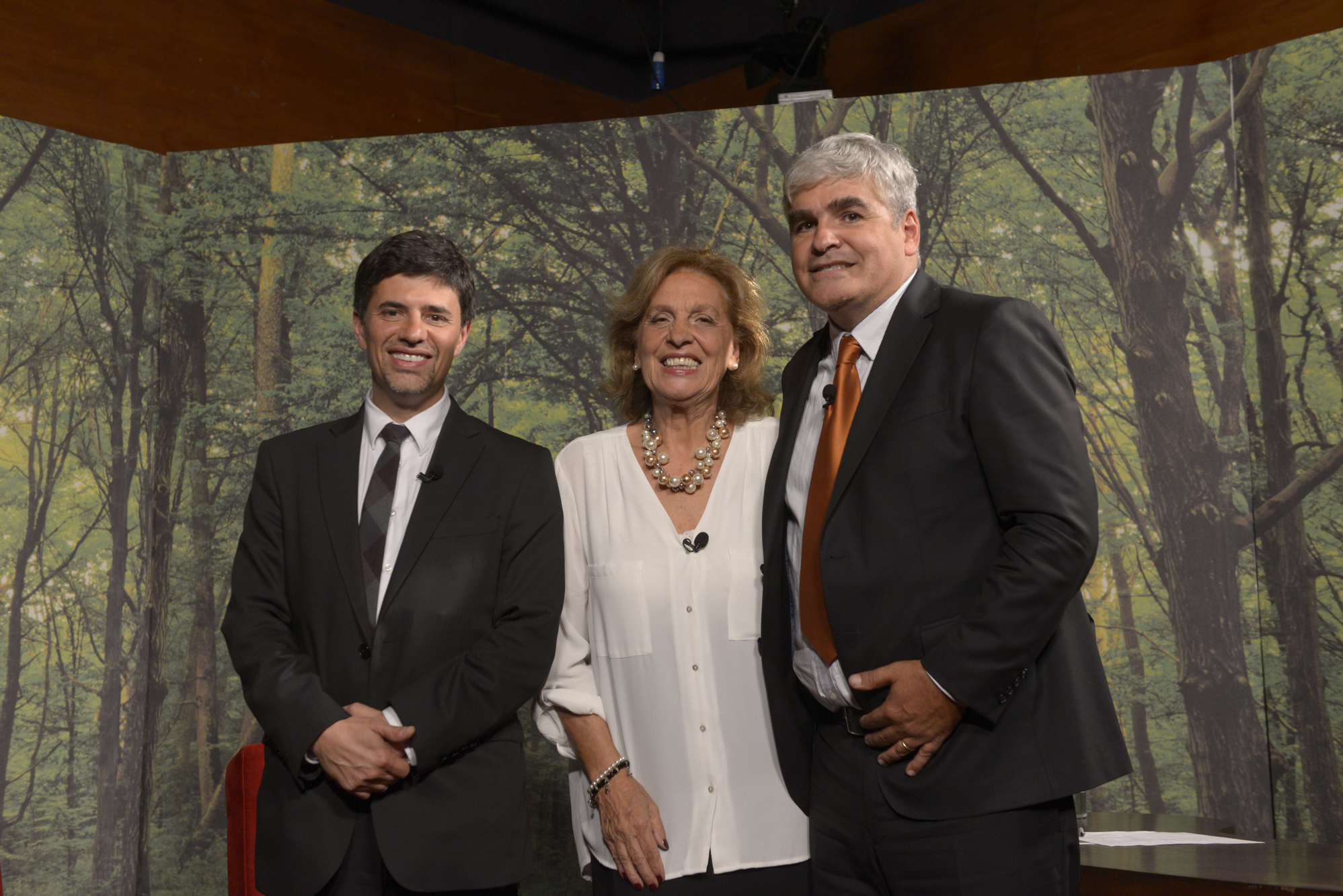 03 Abril 2016, Ministro Marcelo Díaz asiste a programa de TV Nico Late Prime con la conducción de Nicolas Larrain.